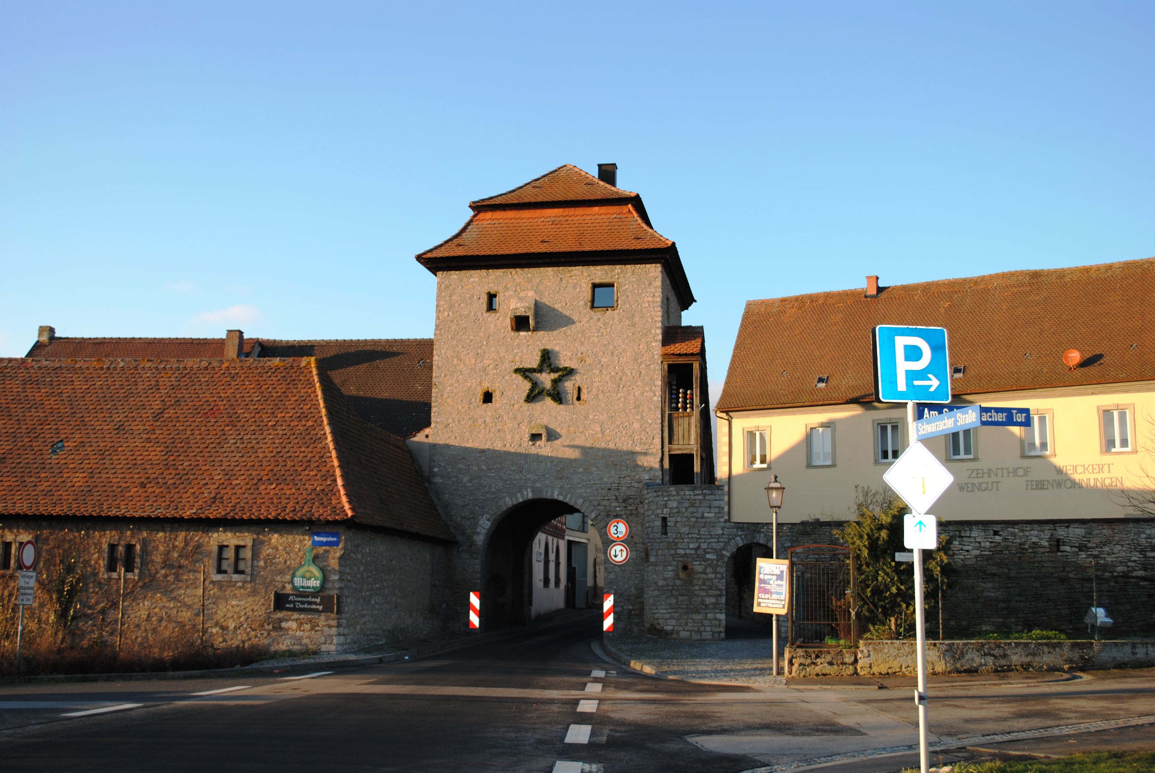 Dorfbefestigung, Sommerach, Ortsbefestigung aus Mauer und Türmen, im 15./16. Jahrhundert entstanden, hat sich auf der Mainseite größtenteils erhalten. Nach Nordosten lässt sich ihr Verlauf am Weg ablesen, der an der Hinterseite der Grundstücke entlangläuft. Zwei Torhäuser sind noch vorhanden; D-6-75-169-1